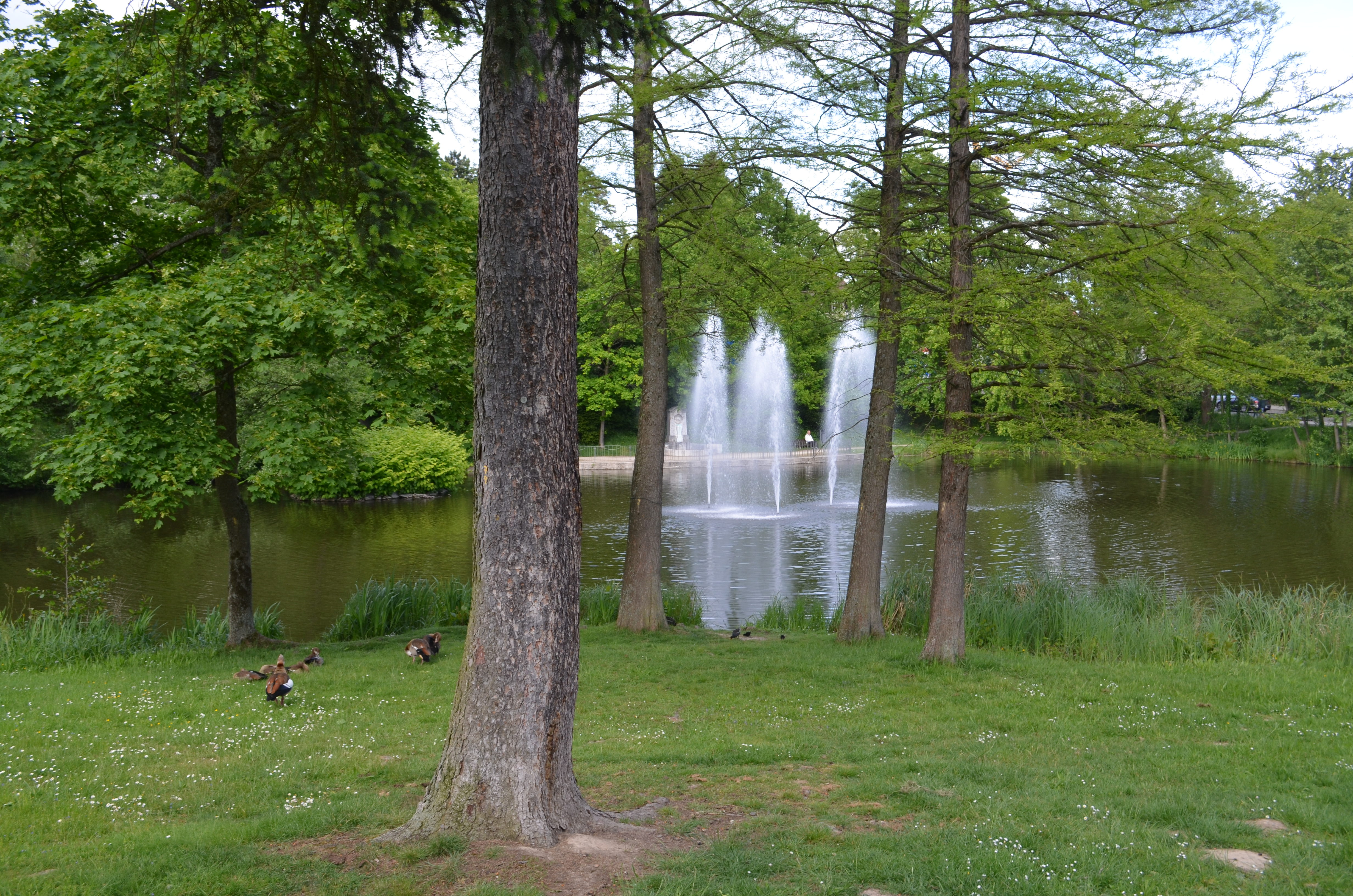 Kronberg, Victoriapark, Schillerweiher